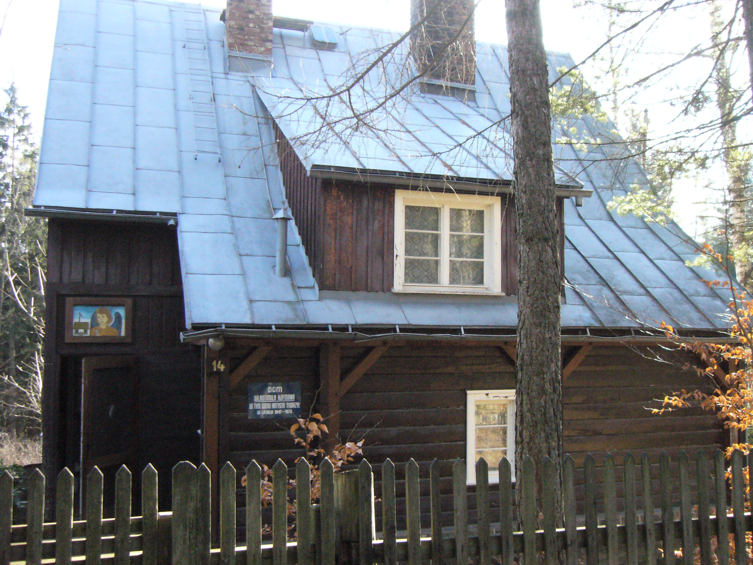 Szklarska Poręba, ul. Matejki 23 - Muzeum - Dom malarza Wlastimila Hofmana, ostatniego ucznia Jacka Malczewskiego